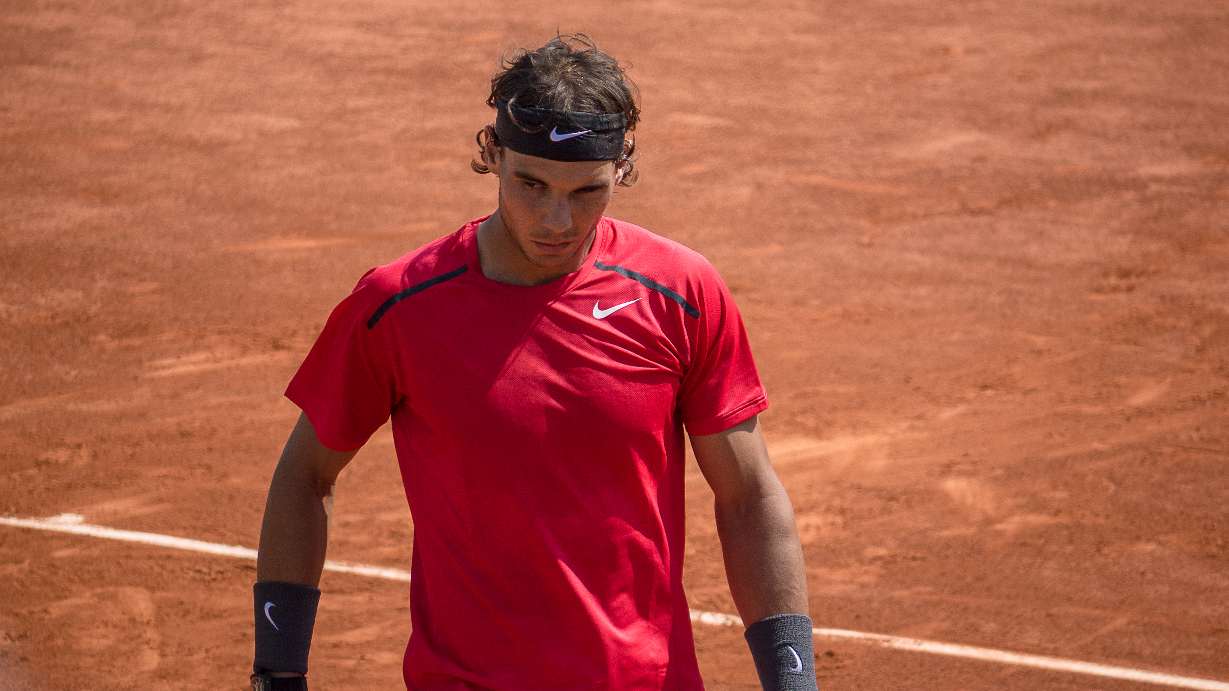 1er tour Roland Garros 2012 : Rafael Nadal (ESP) def. Simone Bolelli (ITA)